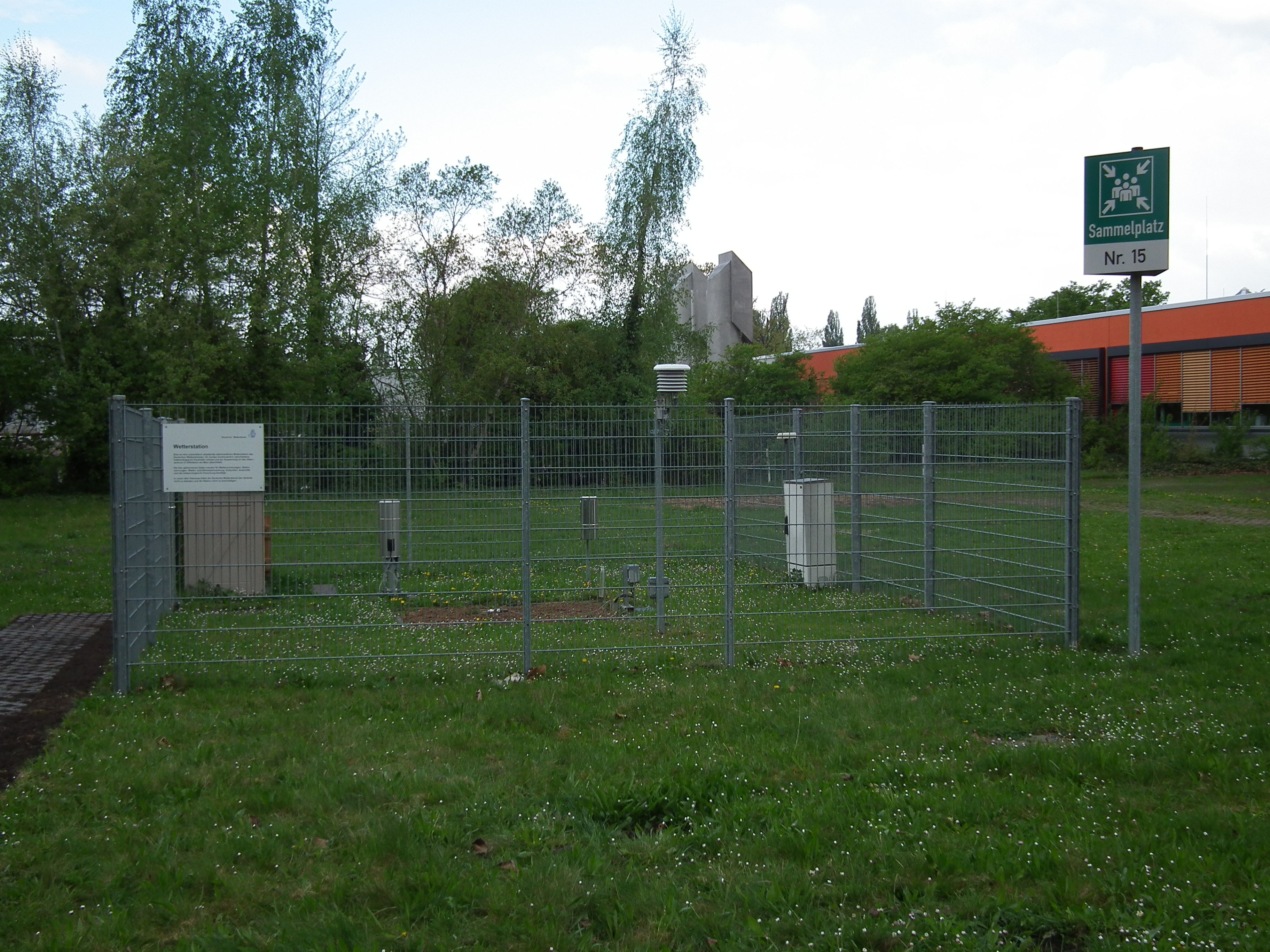 Hinweisschild an der automatisch arbeitenden nebenamtlichen Wetterstation des Deutschen Wetterdienstes im Neuenheimer Feld in Heidelberg (Baden-Württemberg, Deutschland)